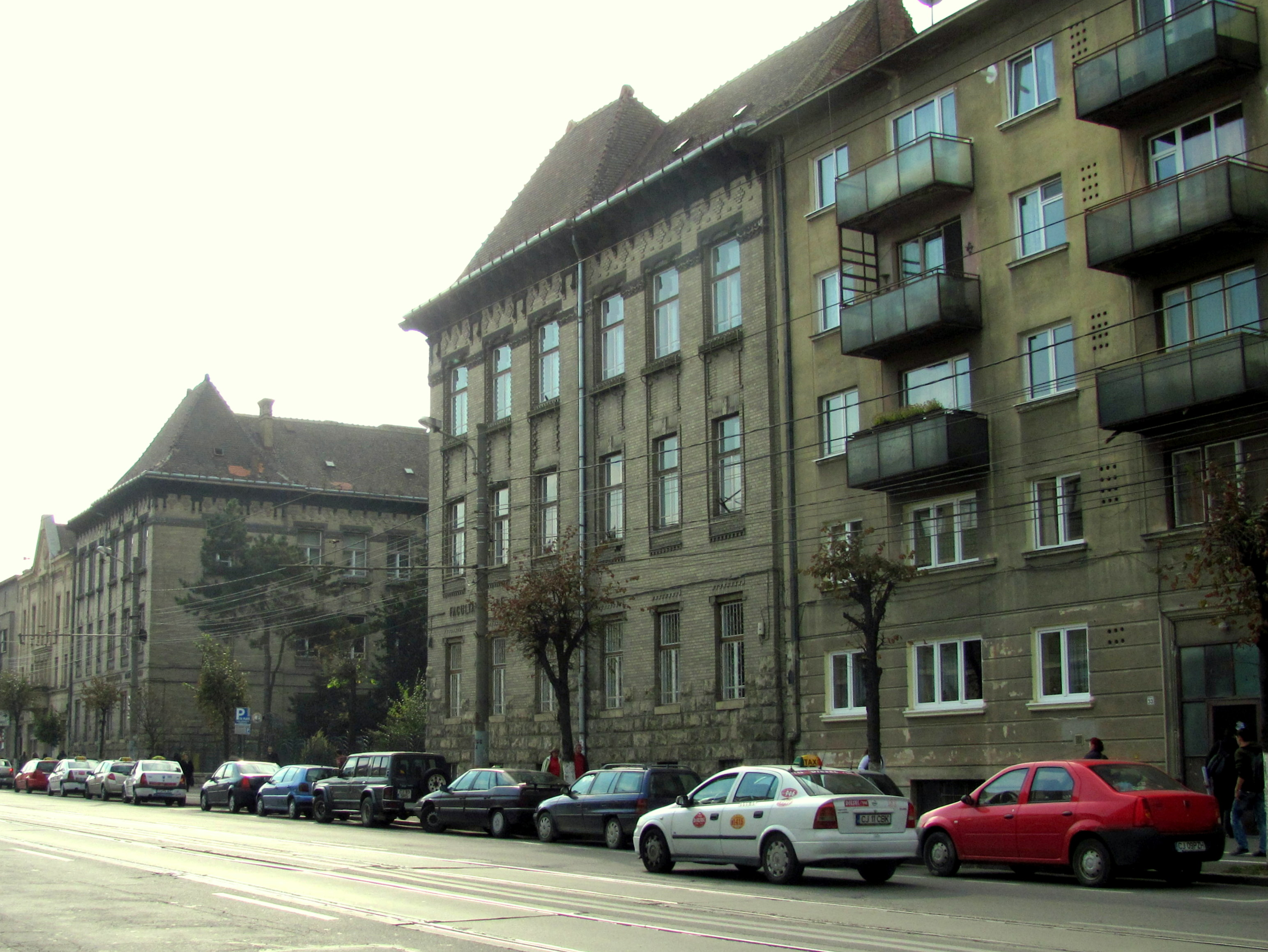 Cluj-Napoca - Str. Horea, Nr.31 - Facultatea de Litere